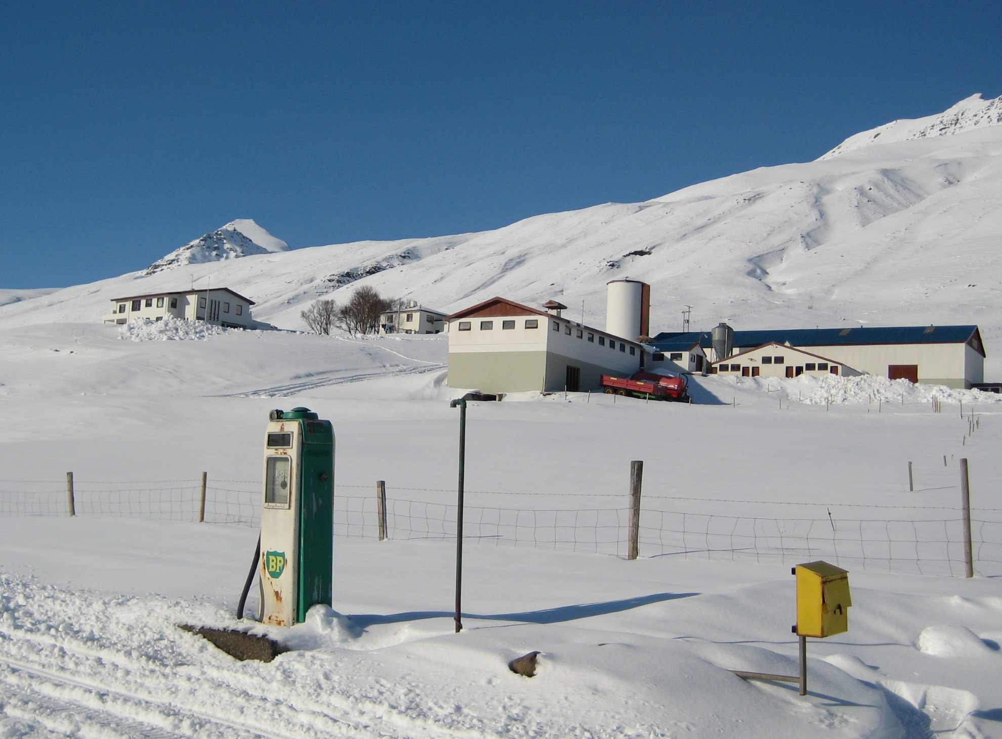 Hóll í Svarfaðardal